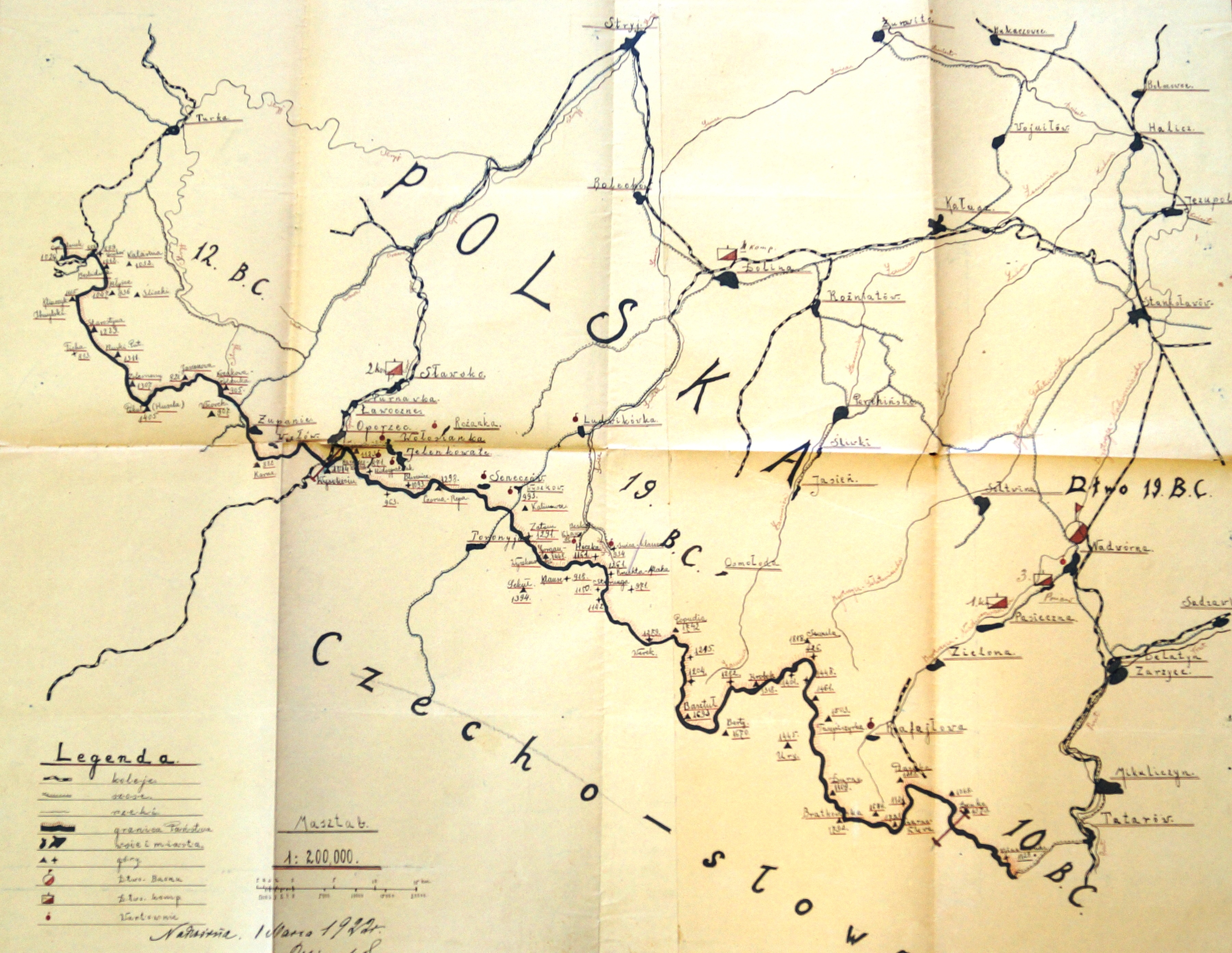 Szkic rozmieszczenia 19 batalionu celnego Nadwórna